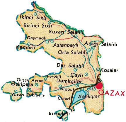 Карта